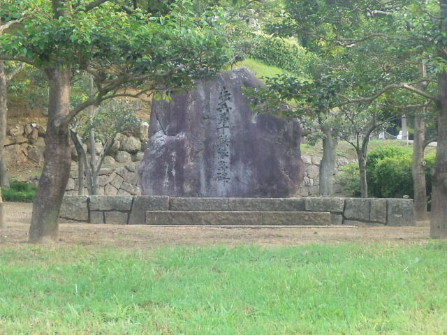 姫路城三の丸に置かれている歩兵第１０連隊跡の石碑。